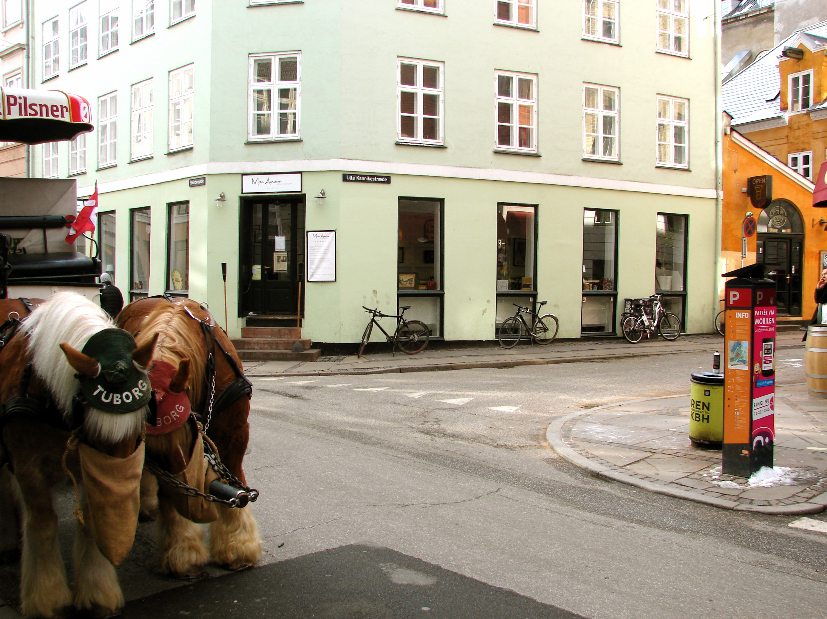 Lille Kannikestræde på hjørnet af Skindergade, København